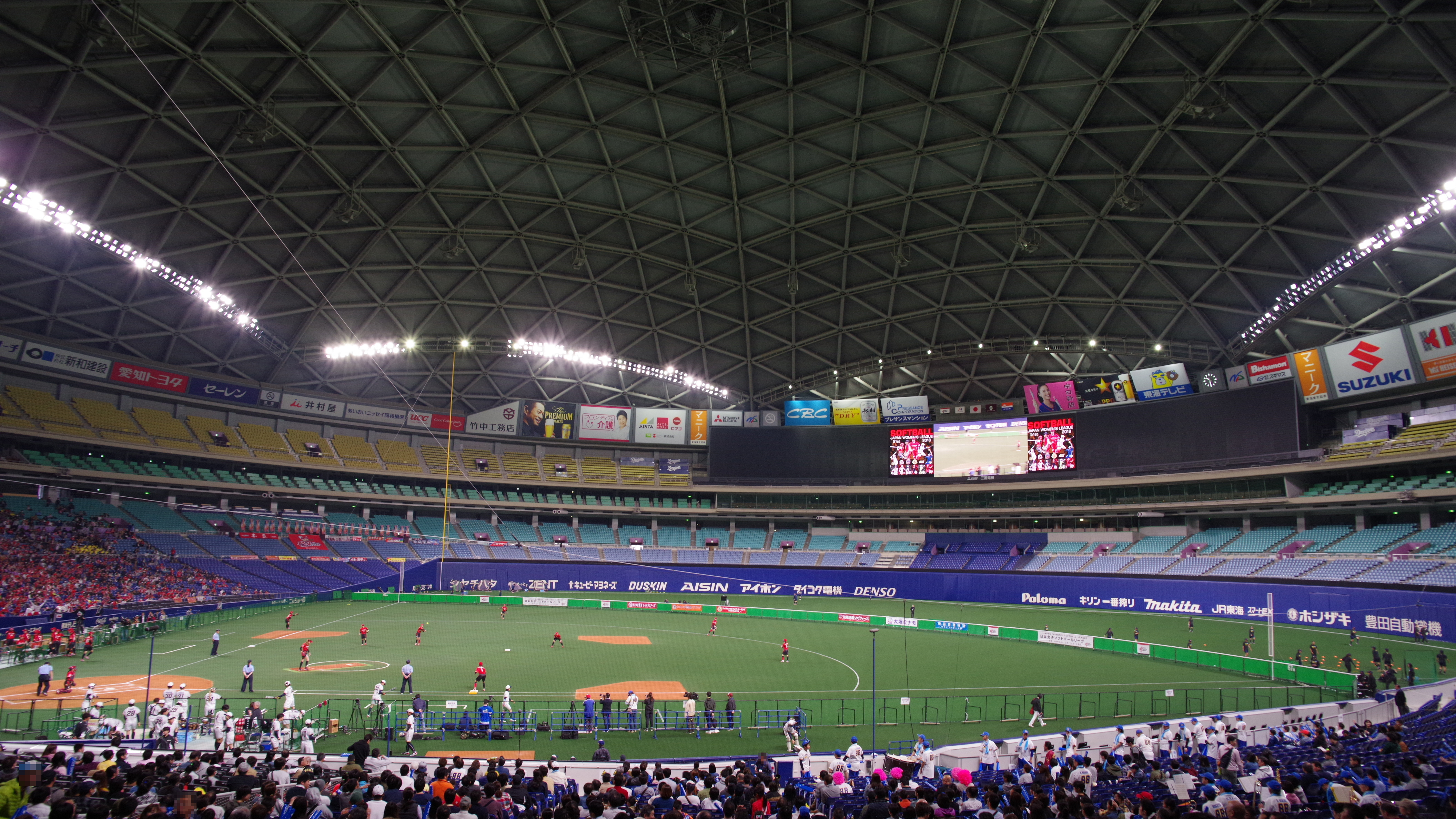 名古屋ドームでの女子ソフトボール トヨタ自動車VS豊田自動織機 1塁側より